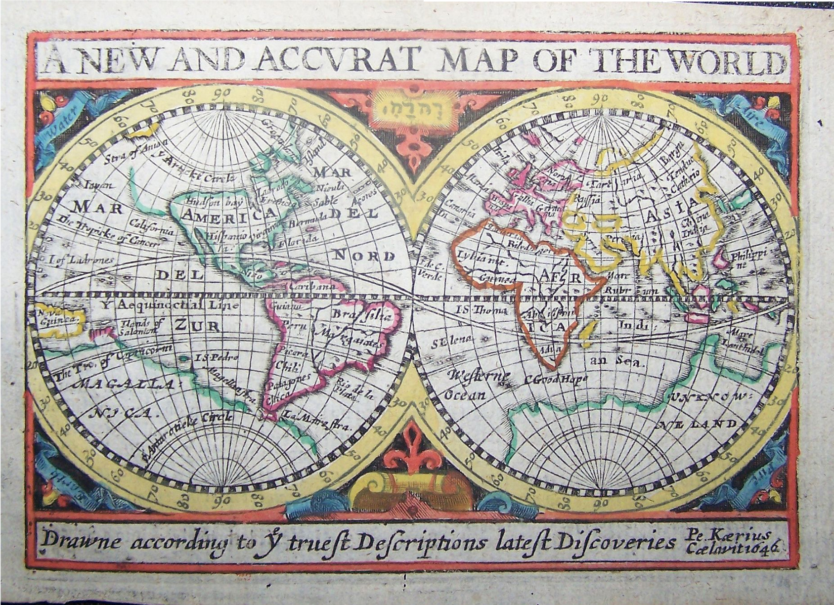 Kaartje v d wereld: A New And Accurat Map Of The World; Eén van de laatst gedateerde werken van v d Keere